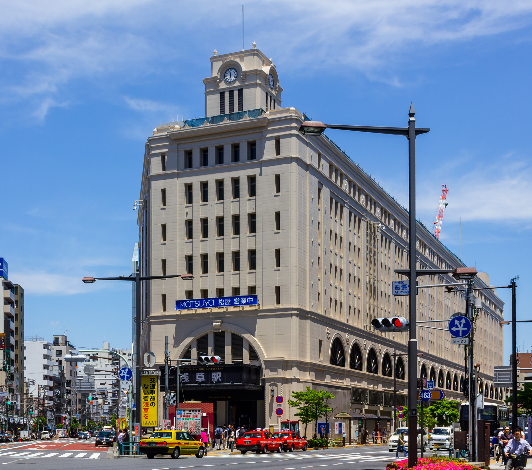 松屋浅草（浅草駅）